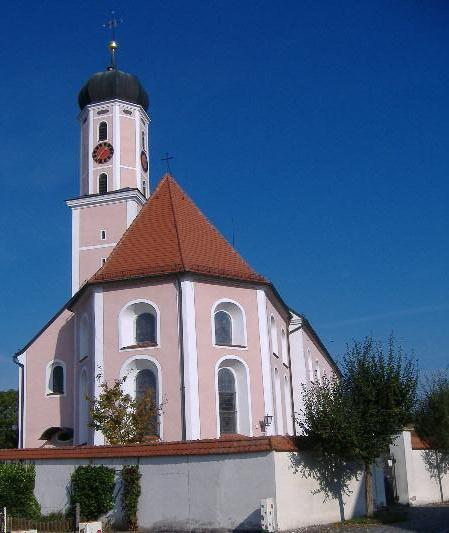 Lutzingen